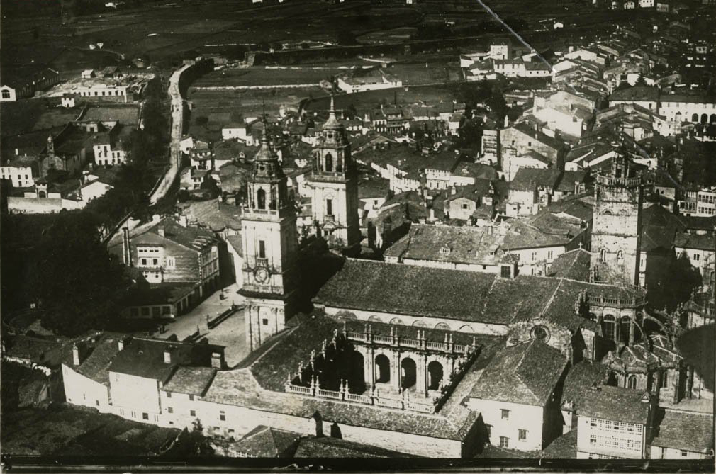 Vista aérea de 1921 do burato aberto ilegalmente polo alcalde Ánxel López Pérez para construir a Porta do Hospital que motivou a declaración da Muralla coma Monumento Nacional para evitar novas modificacións na súa estrutura.